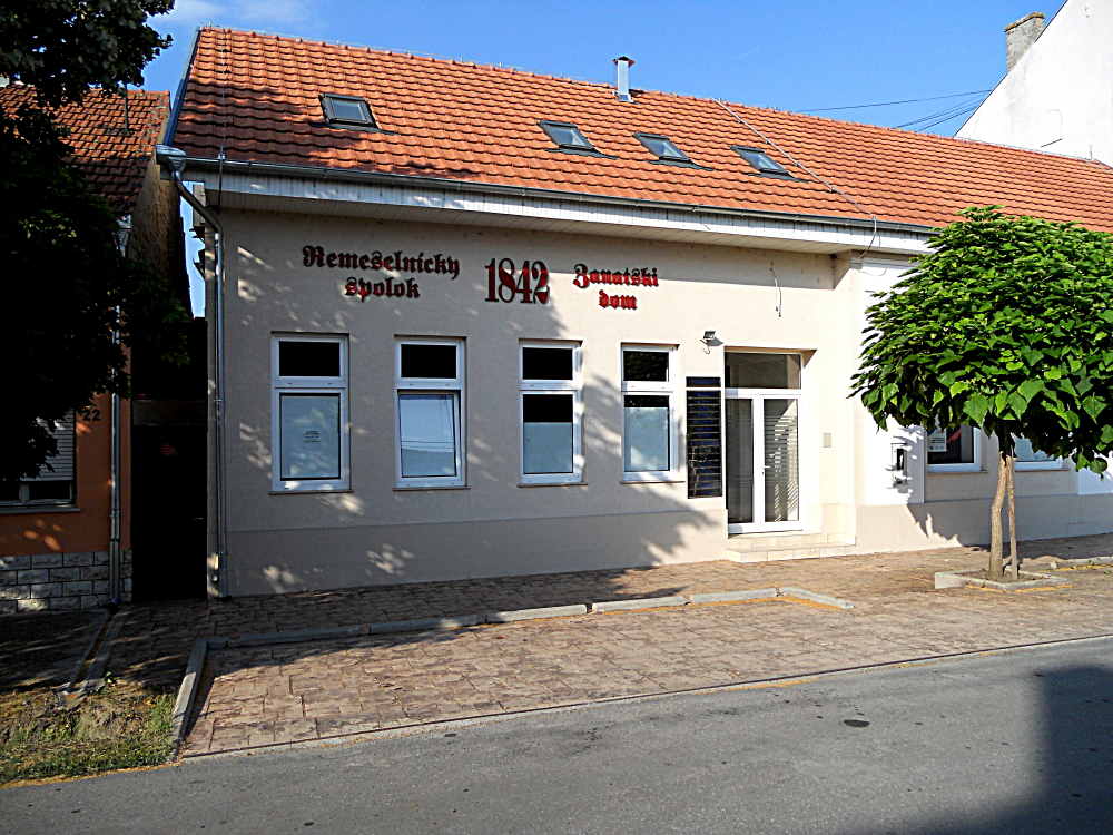 Zanatski dom u Bačkom Petrovcu